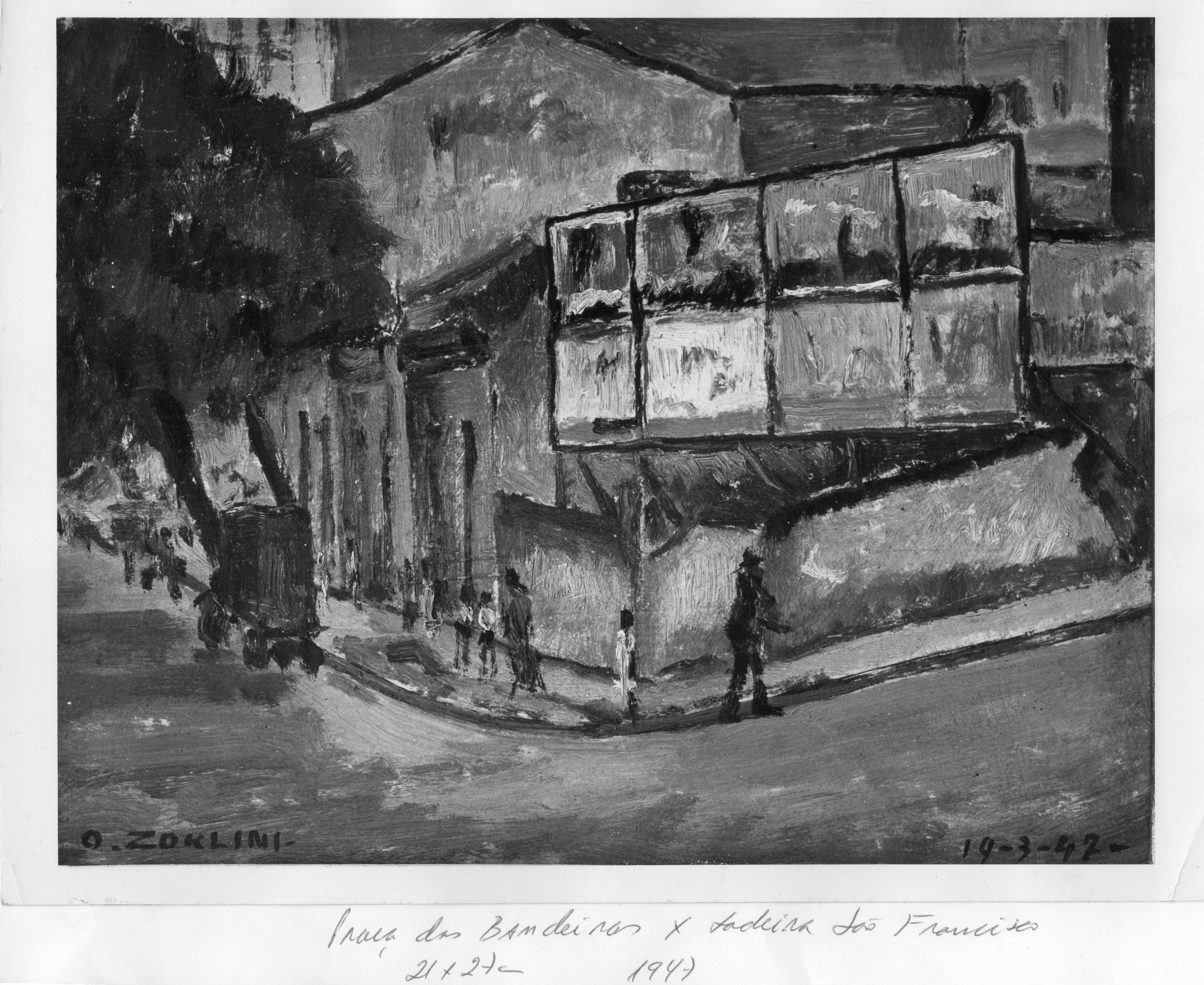 Praça das Bandeiras, São Paulo. 21x27cm. Óleo sobre cartão.